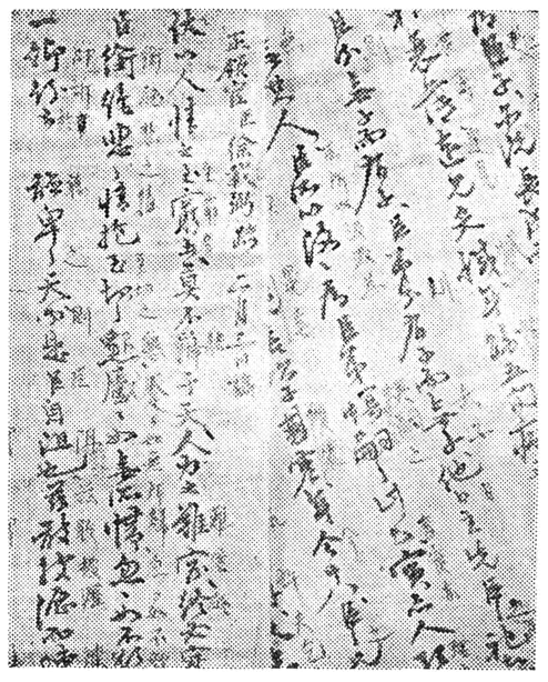 1898년 12월 미국에서 조선 한성으로 보낸 서재필 양자 입양 허용 탄원서